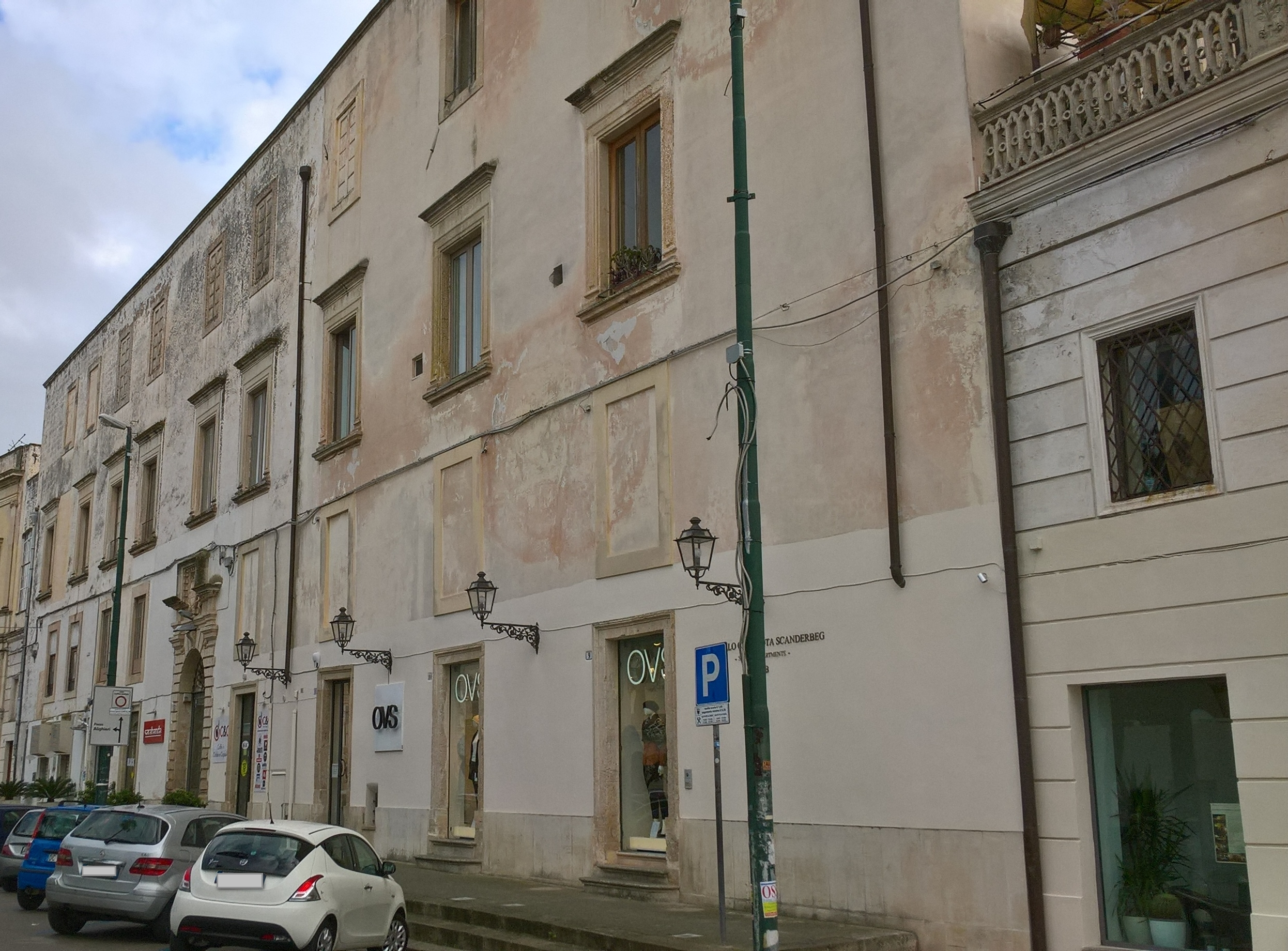 Castello ducale di Galatina, oggi